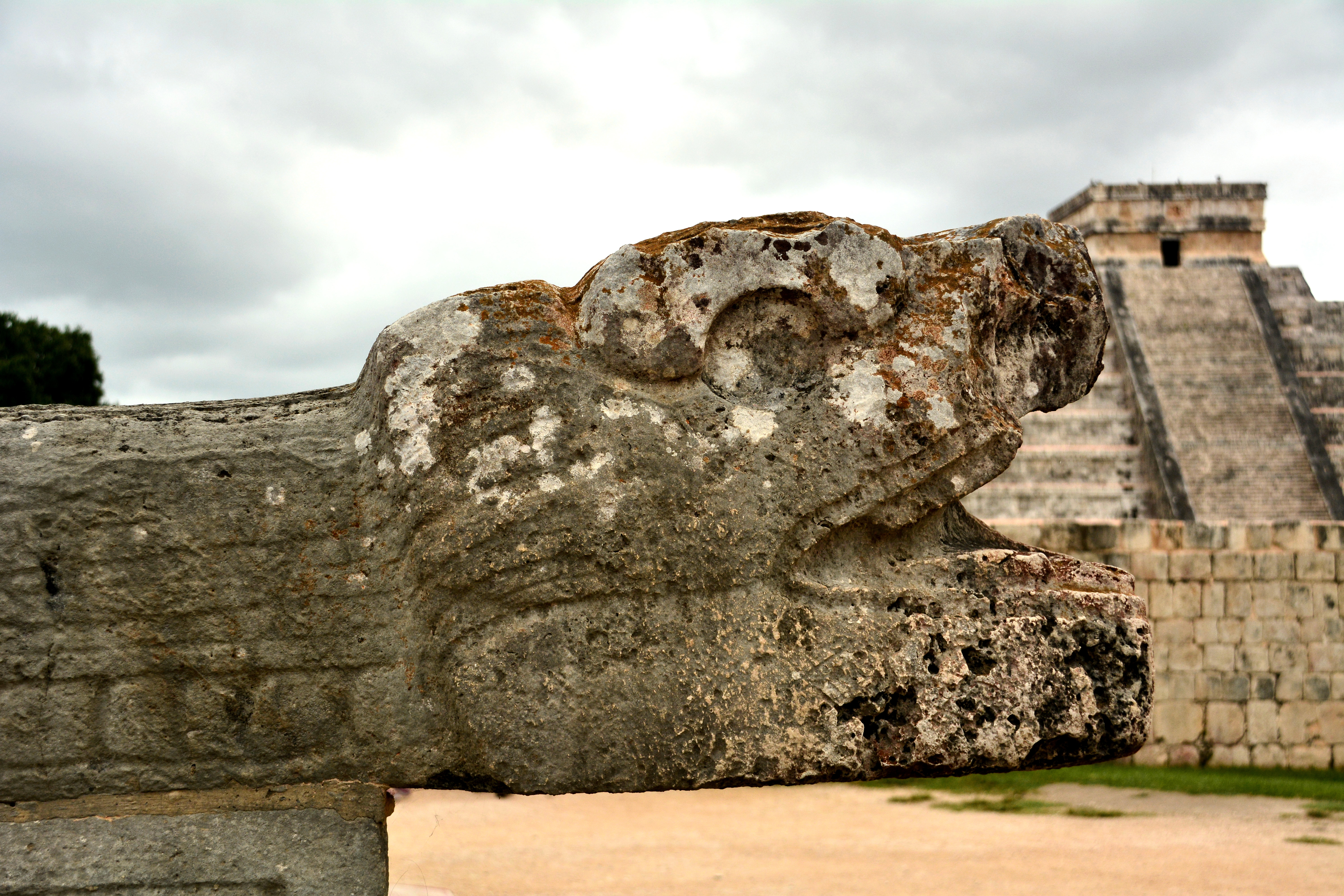 Detalle del complejo arqueológico Chichén-Itzá.